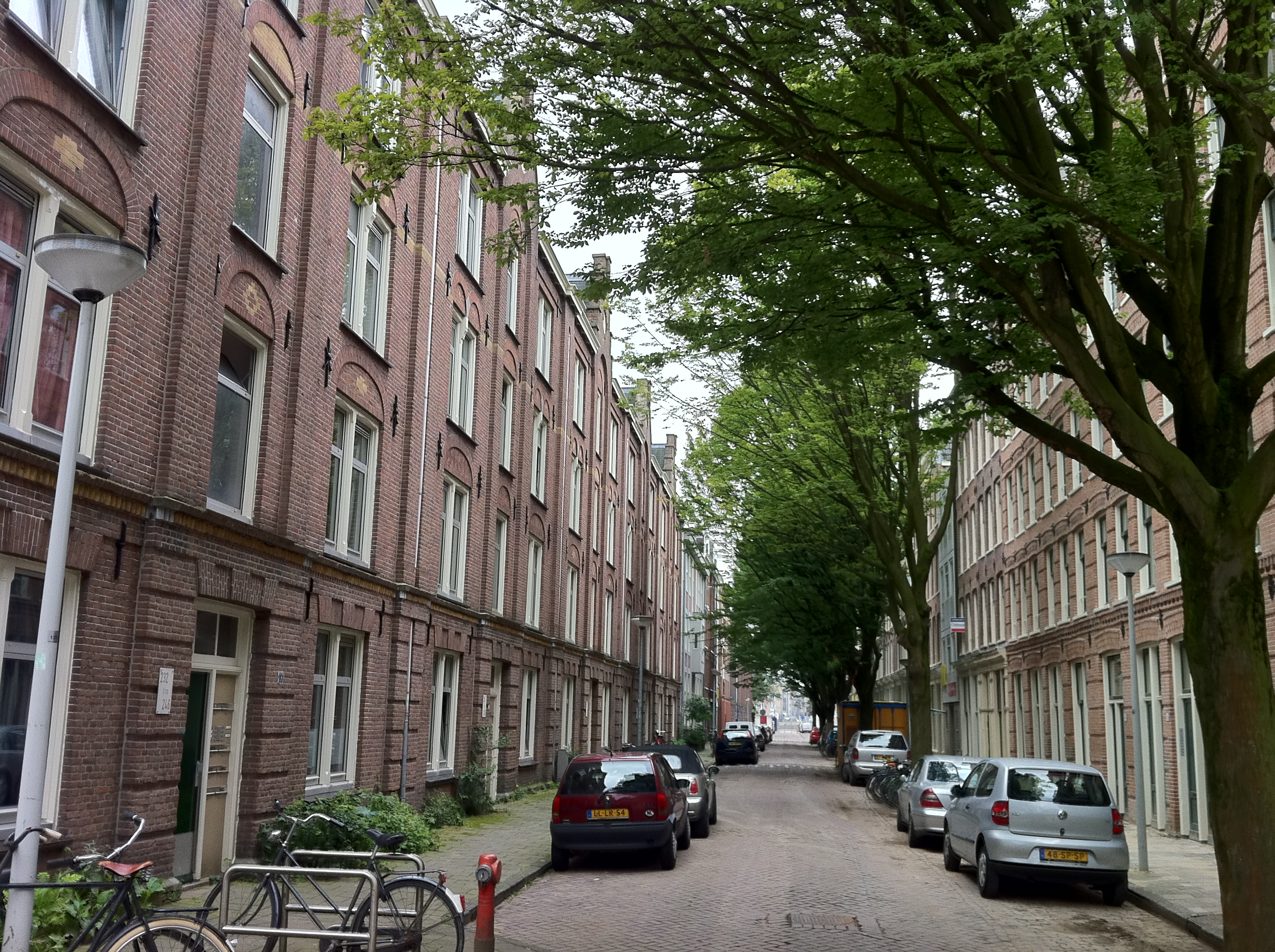 Czaar Peterbuurt Amsterdam, links Blankenstraat 32-40, 40 2-kamerwoningen gebouwd door de Amsterdamsche Vereeniging tot het bouwen van Arbeiderswoningen in 1881, Kraijenhofstraat 31-39 staat ernaast en is identiek, architect Bastiaan de Greef